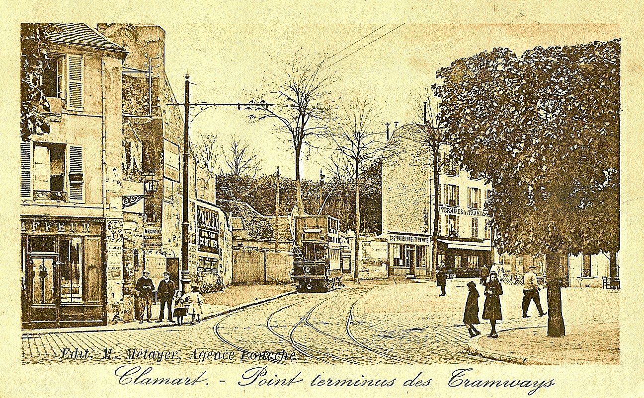 Carte postale ancienne éditée par Métayer - Agence Fourche CLAMART - Point terminus des tramways